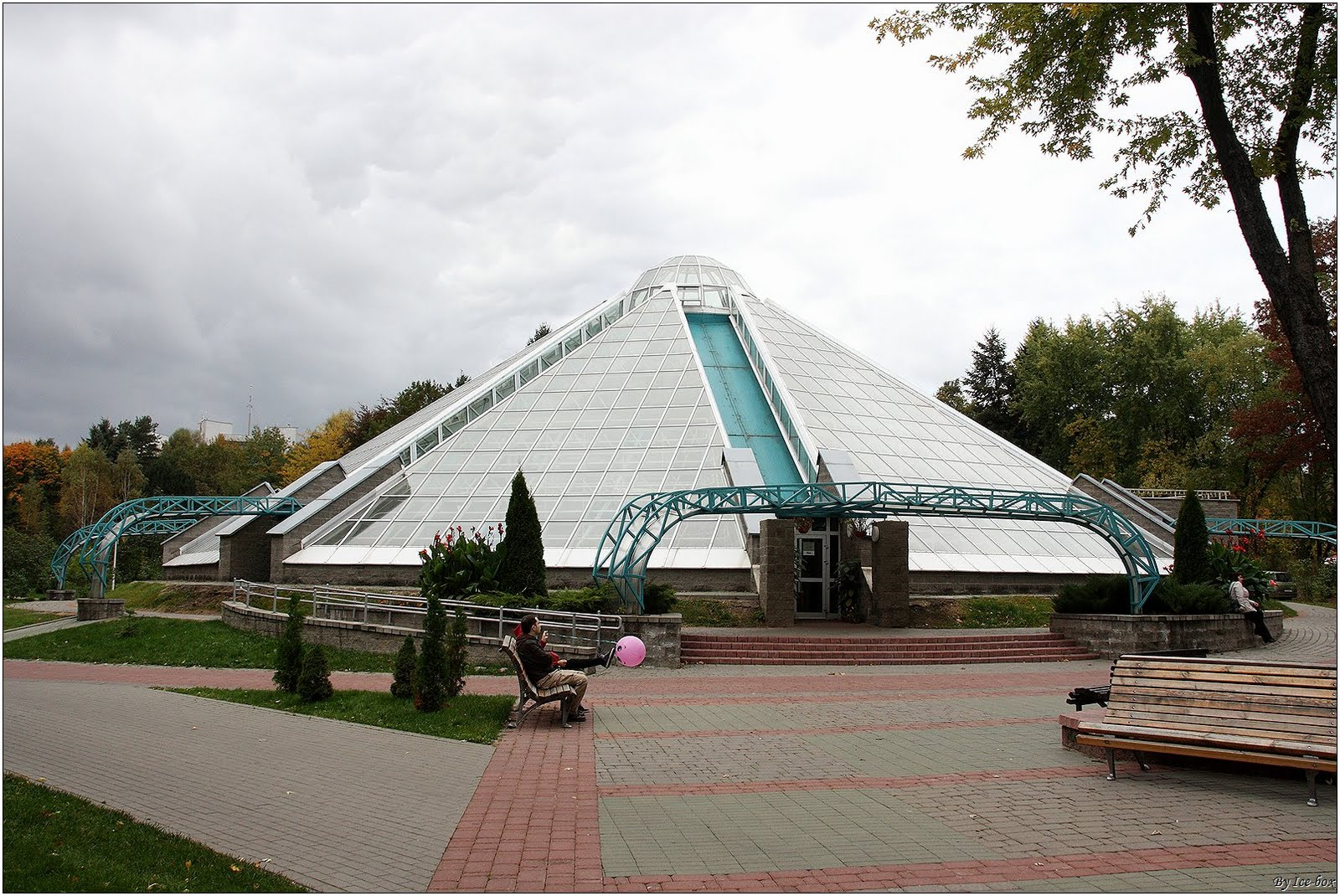 ЦБС. Аранжарэя